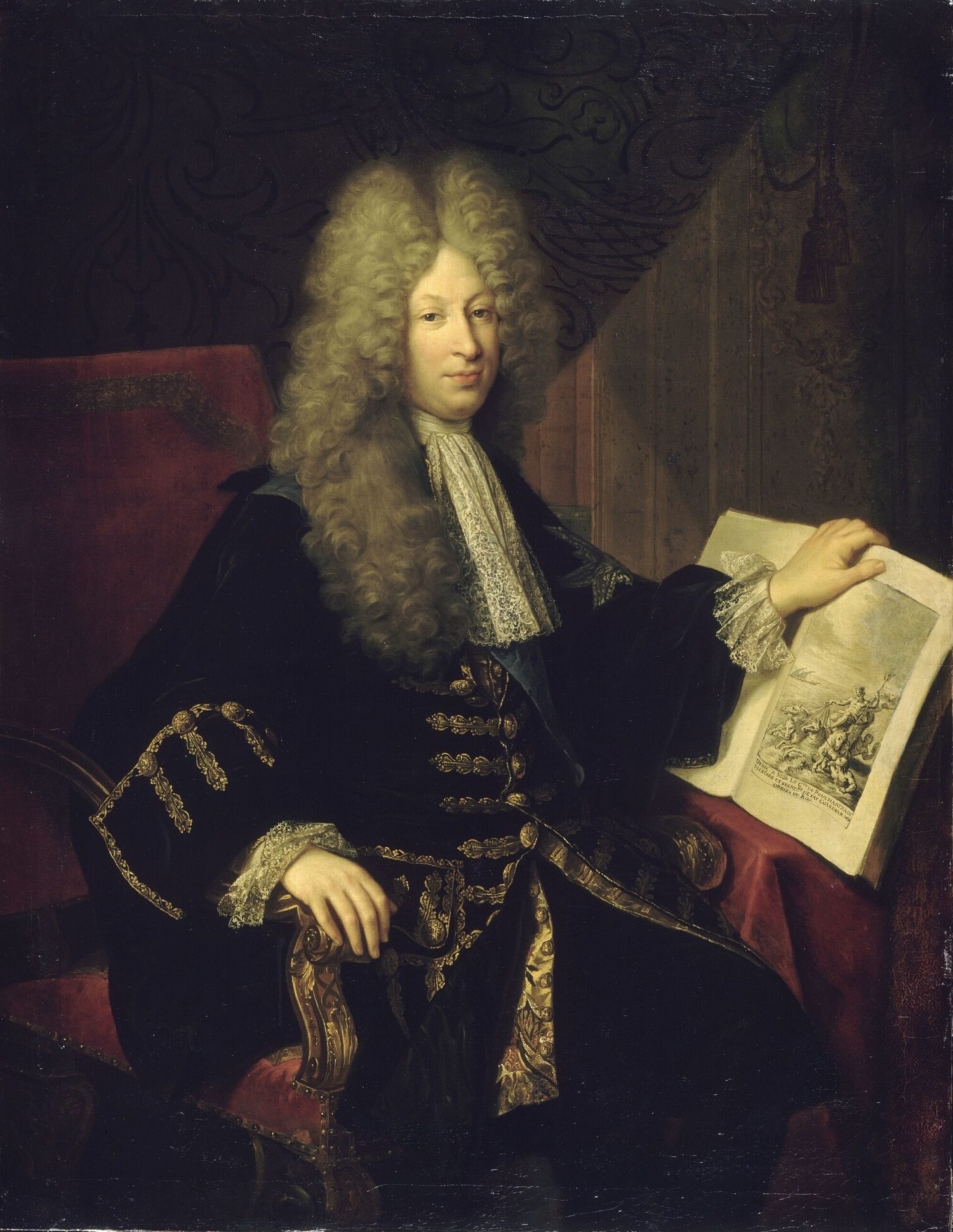 Portrait de Jérôme Phélypeaux, comte de Pontchartrain, ministre de la marine de Louis XIV de 1699 à 1715. Fils de Louis Phélypeaux. Secrétaire d'Etat de la Marine